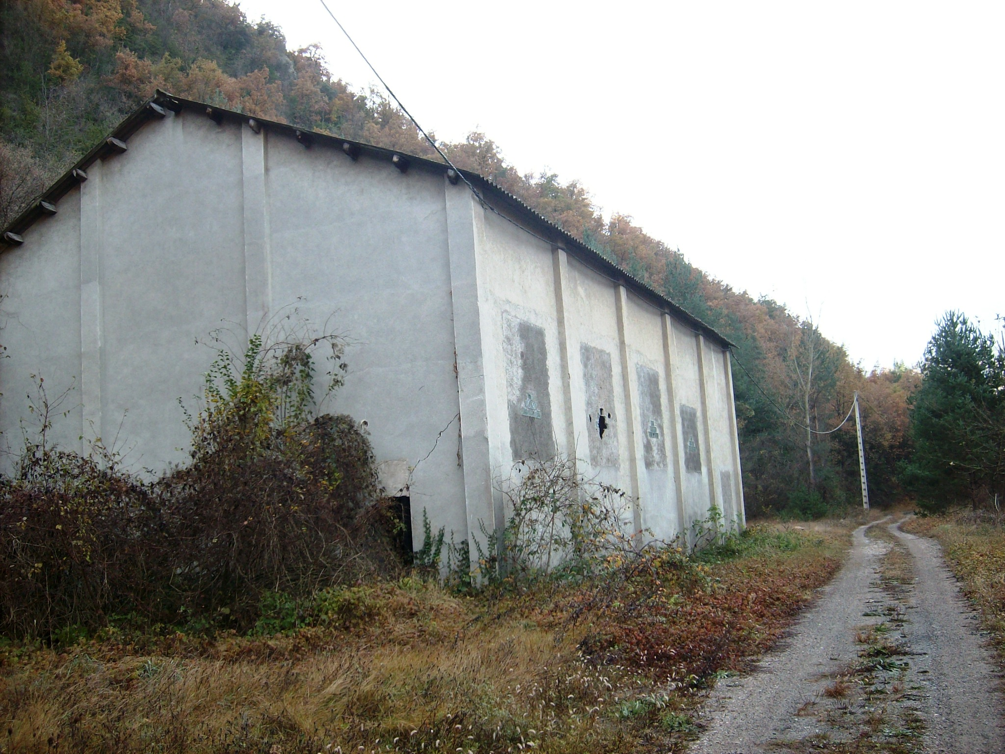 Mina del Far, Edifici de les dutxes. Edifici on hi avien els vestidors dels minaires i les dutxes